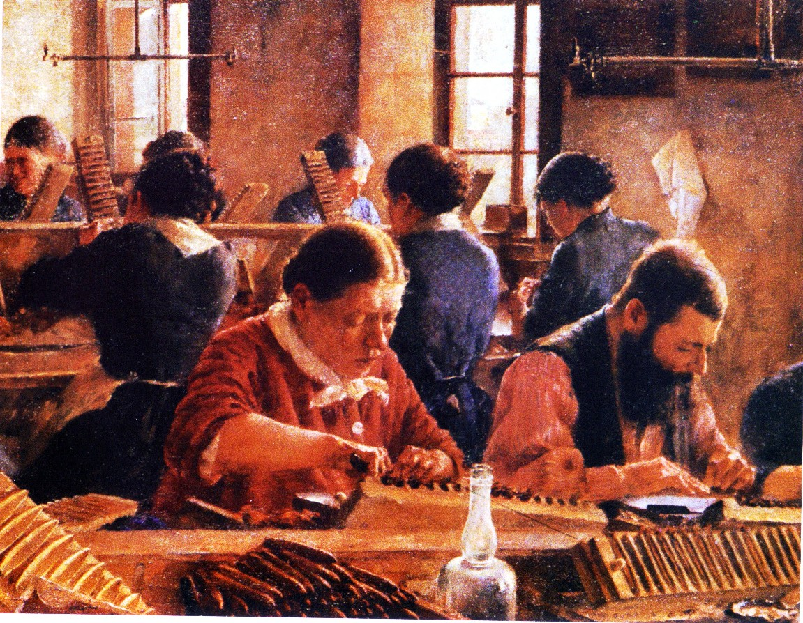 Zigarrenmacher (Gemälde von Johannes Marx (gestorben 1933) aus dem Jahre 1889)